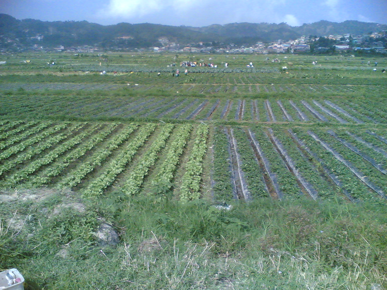 Tagalog: Palayan sa La Trinidad, Benguet (aking gawa)